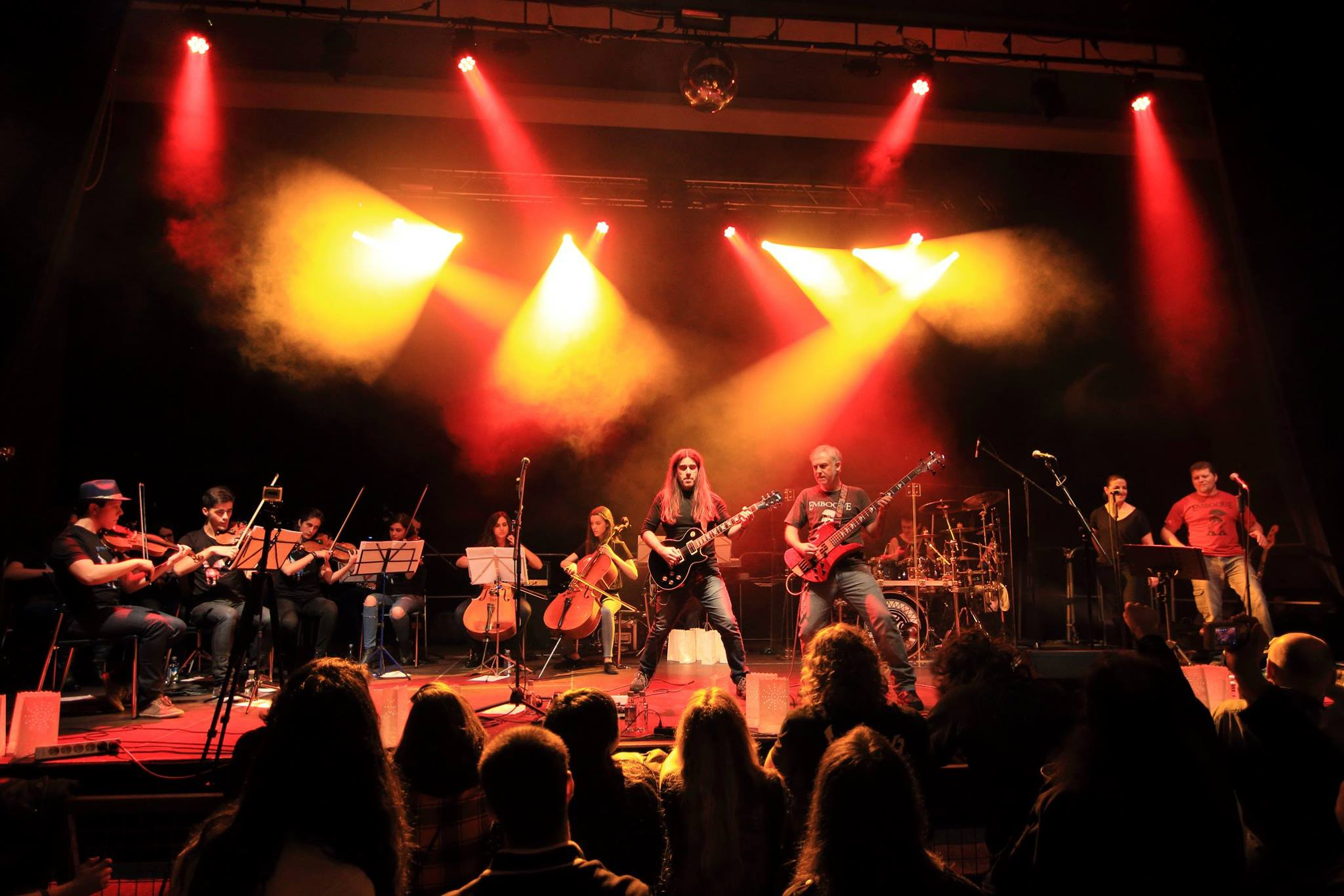 EMBOQUE ORQUESTA